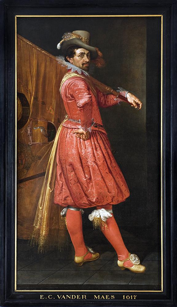 Portret van Willem Jansz. Cock, vaandeldrager van het Oranje Vendel van de Haagse Schutterij. Schilderij bevindt zich in het Haags Historisch Museum.